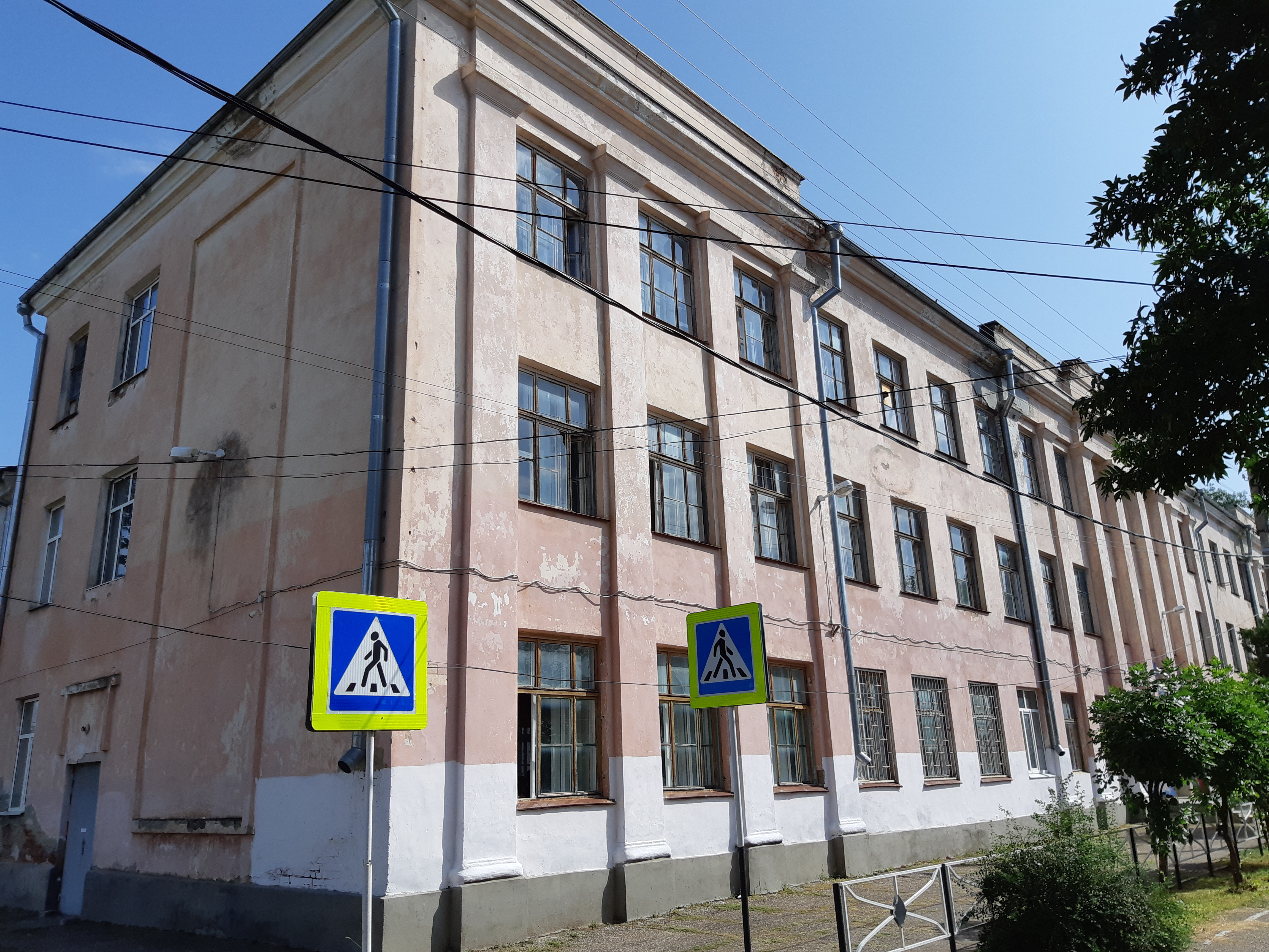 Здание, где учились в школе герои Советского союза В.М. Тюков и Н.В. Кутенко: улица Комсомольская, 276, Майкоп, Адыгея